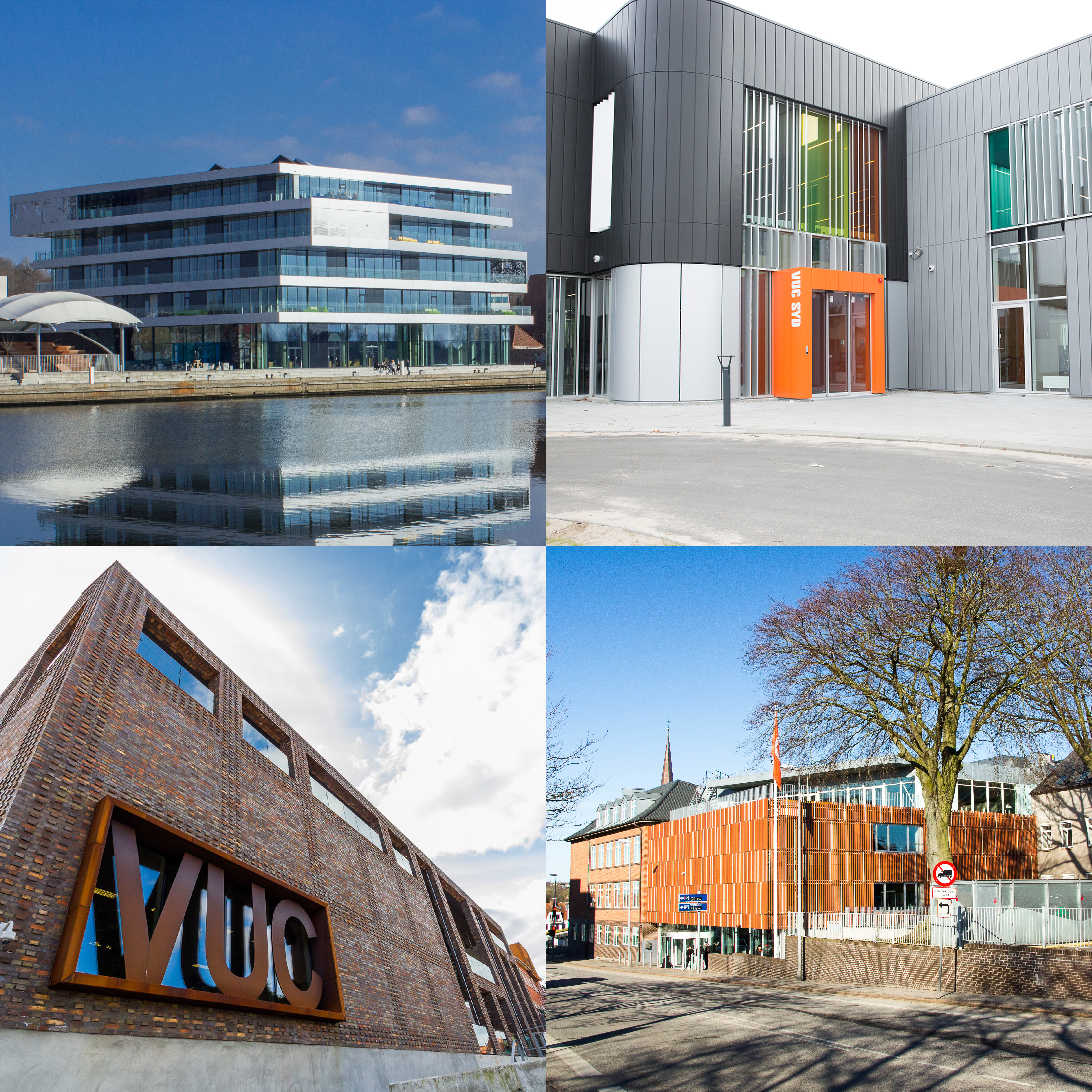 VUC Syds afdelinger i Haderslev, Tønder, Aabenraa og Sønderborg.